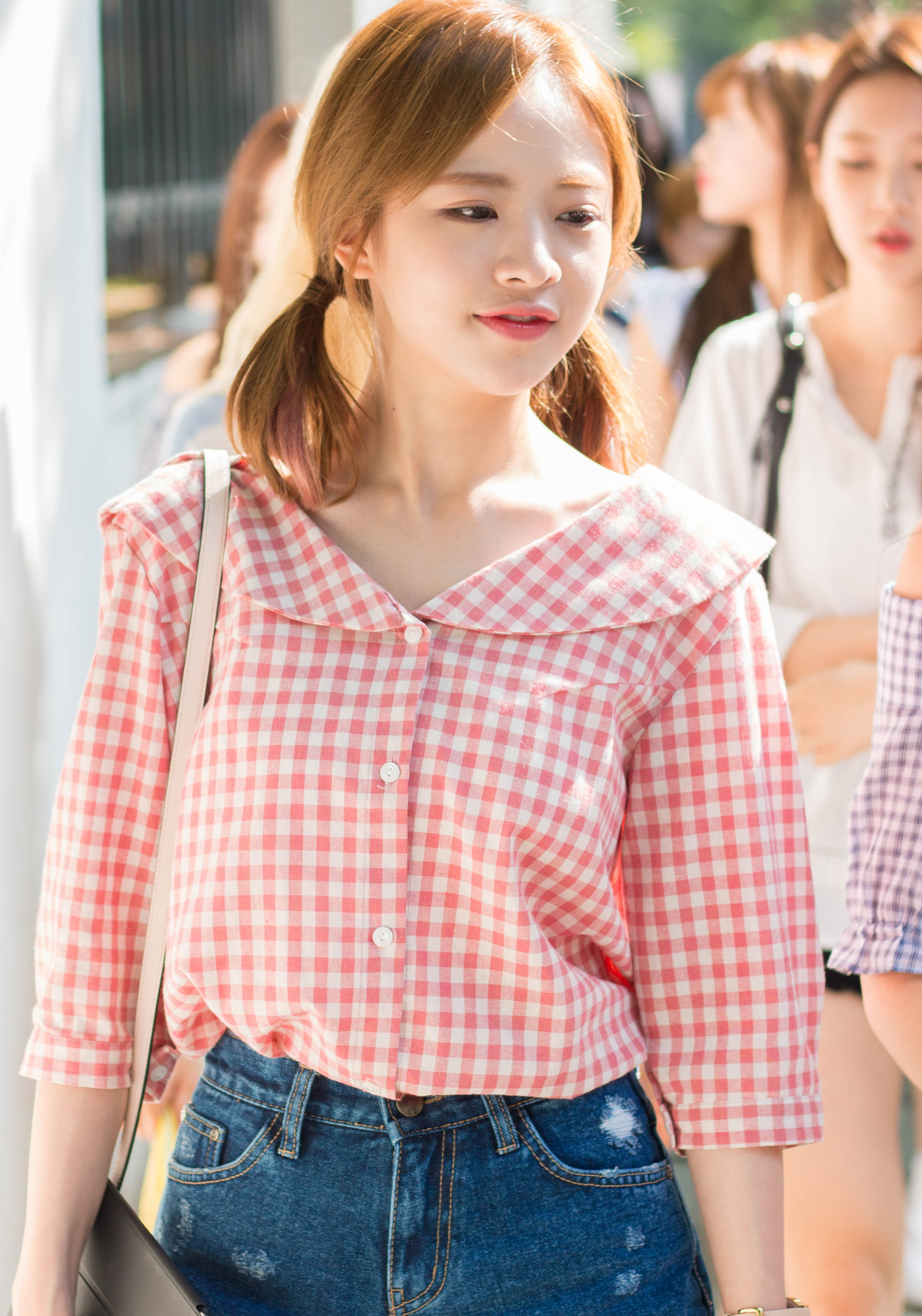 160805 오마이걸 뮤직뱅크 중간퇴근길